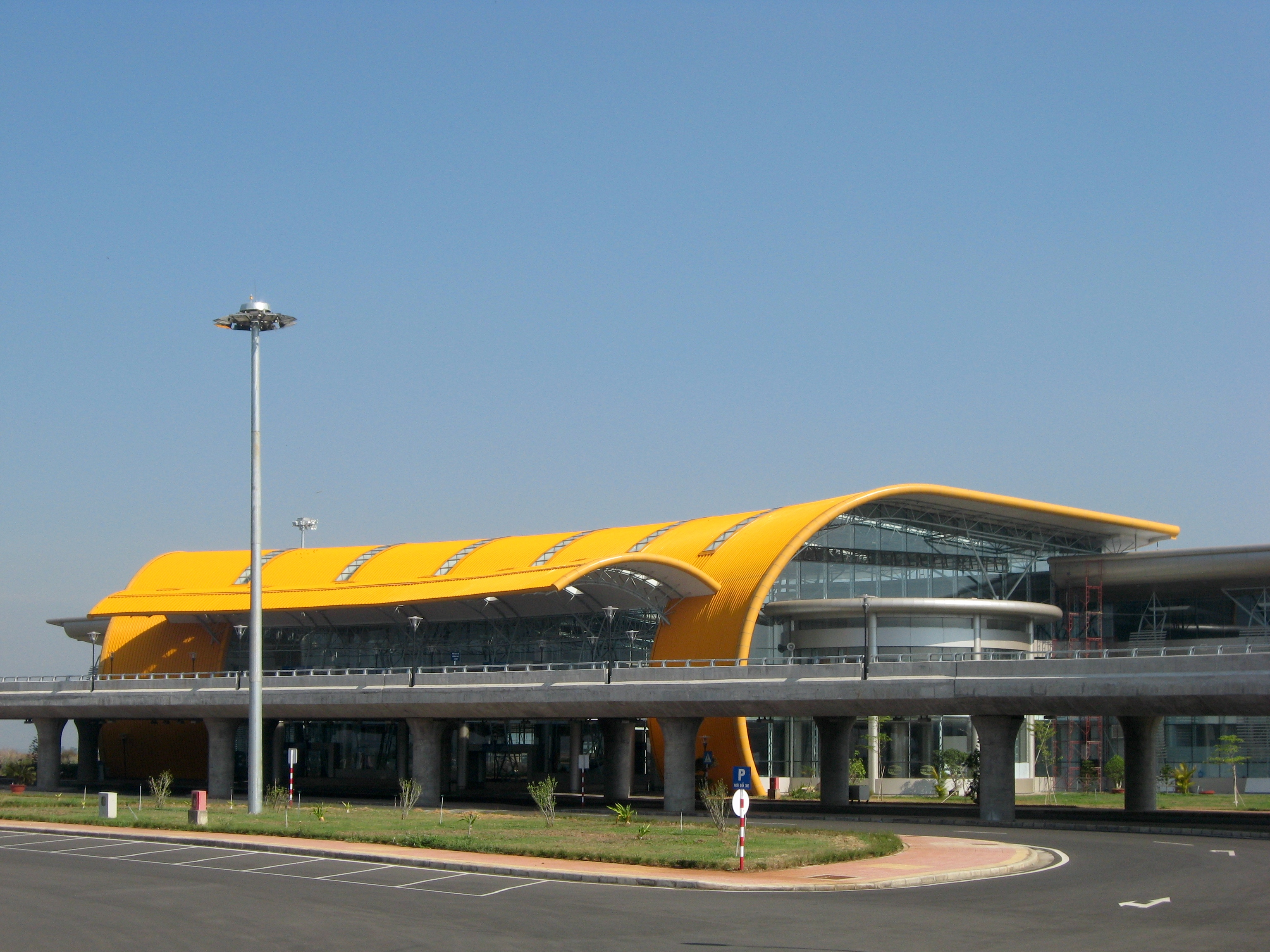 Lien Khuong Airport